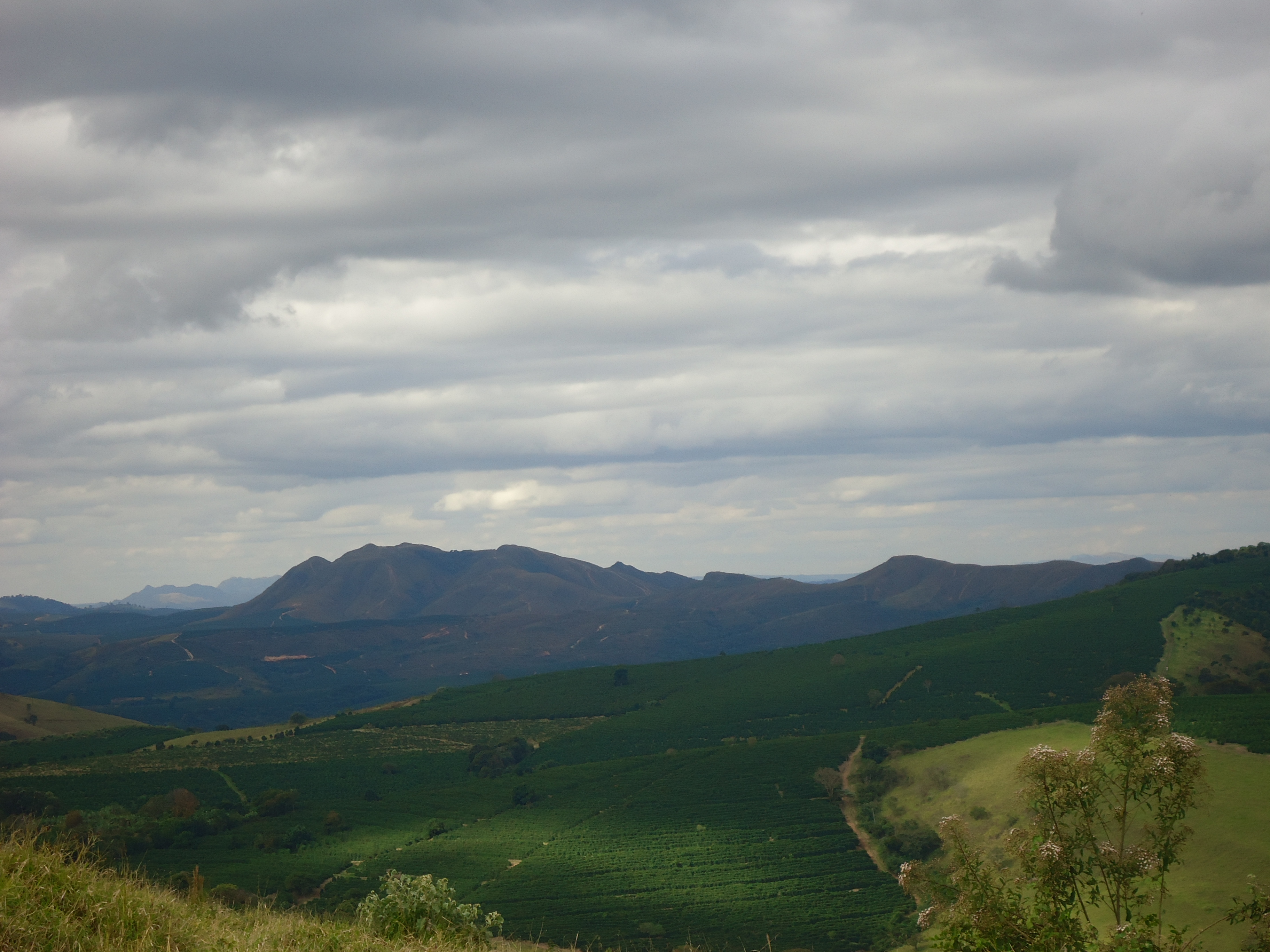 A serra de Três Pontas destaca-se na paisagem, com seus picos proeminentes.